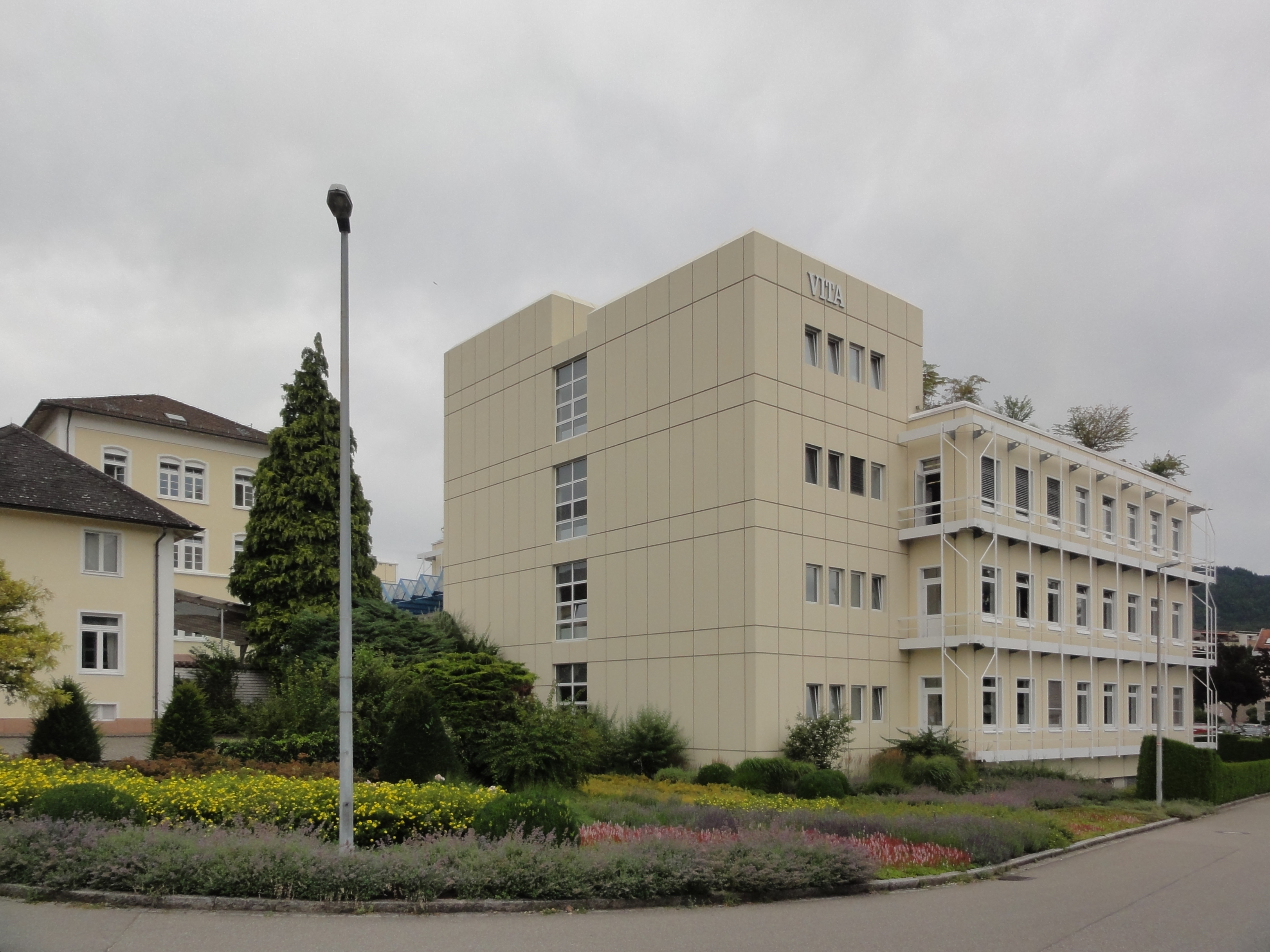 Germany, Bad Säckingen